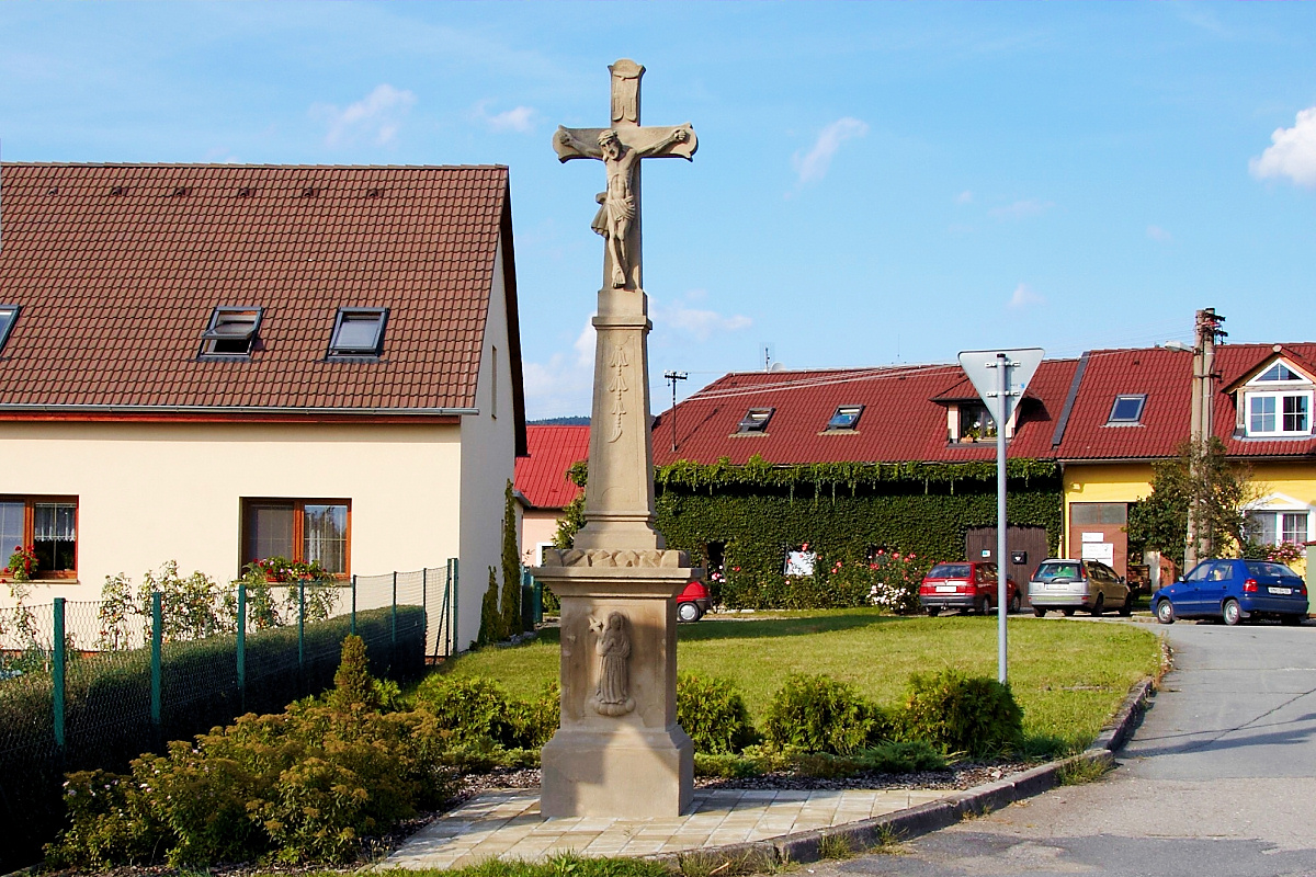 Kamenný kříž, Horní Lapač.